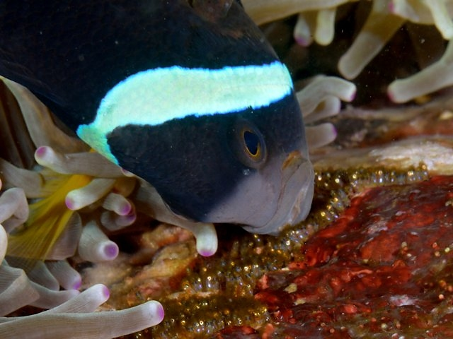 クマノミ Amphiprion clarkii